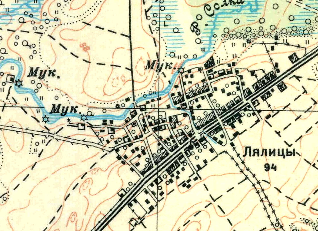 Топографическая карта Ленинградской области, квадрат О-35-22-Г-а (Керстово), деревня Лялицы.